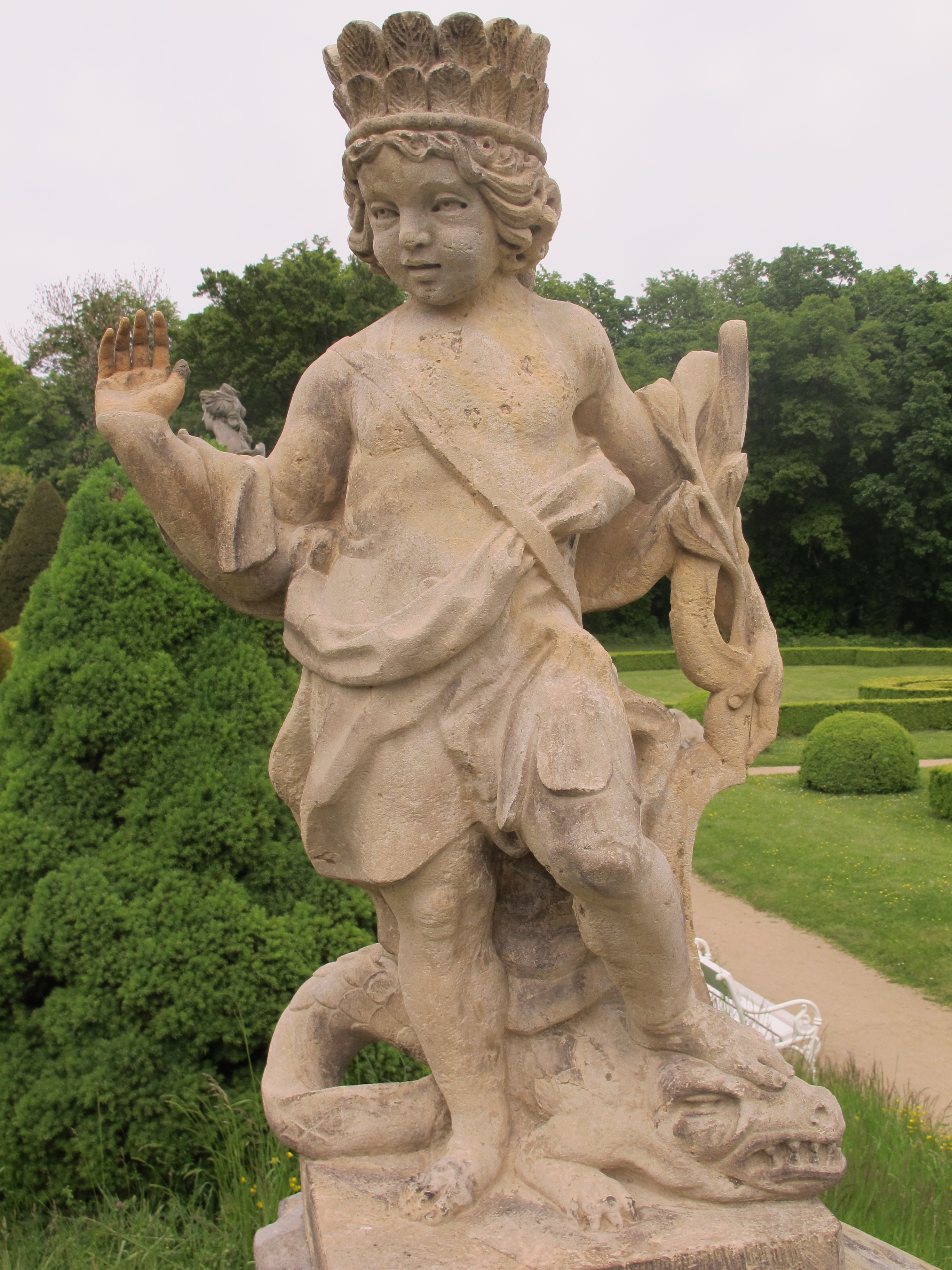 Alegorická socha Amerika. Zámek Lysá nad Labem, Zámecká 1/21, Lysá nad Labem